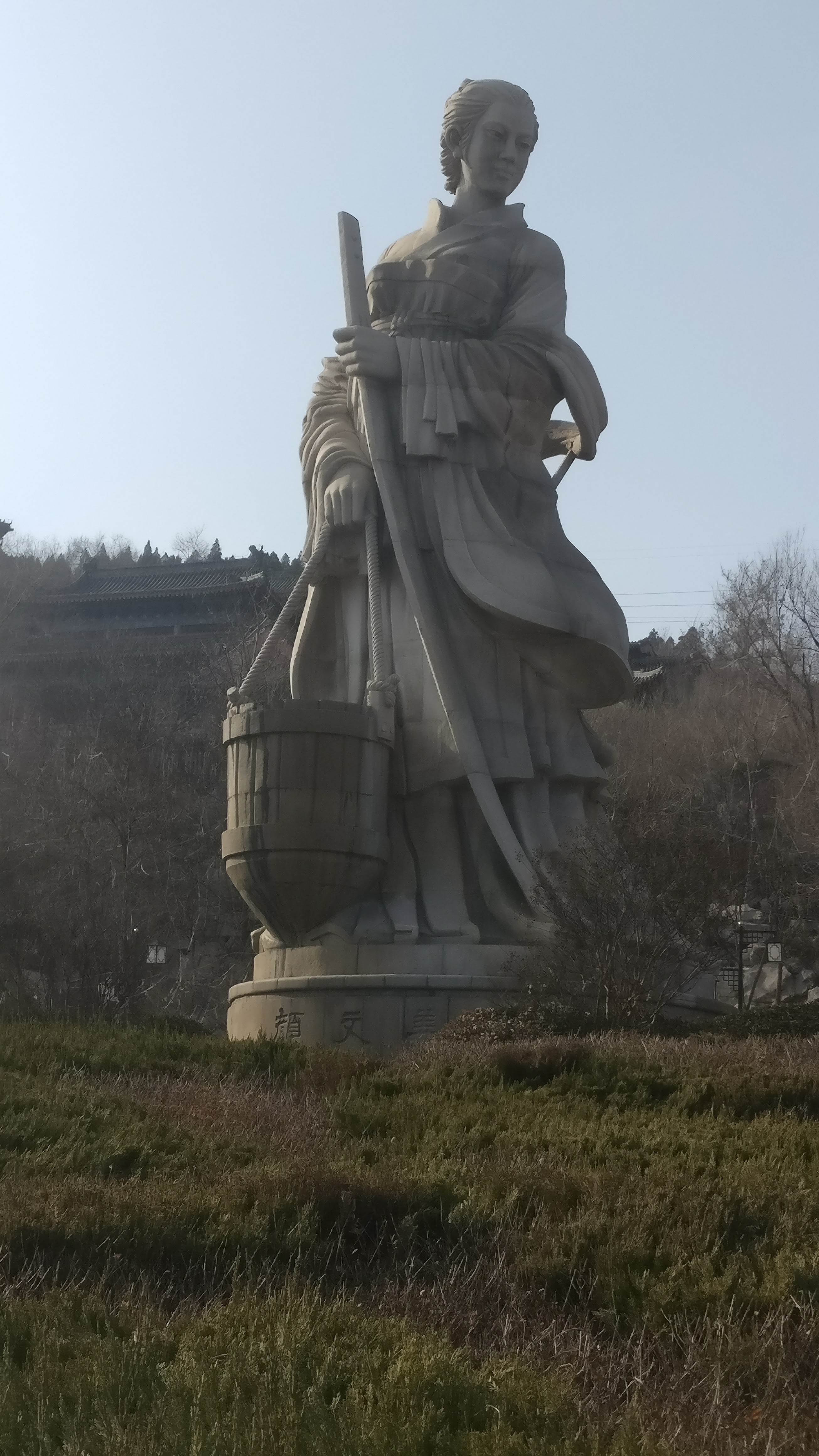 中文（中国大陆）: 颜文姜雕像